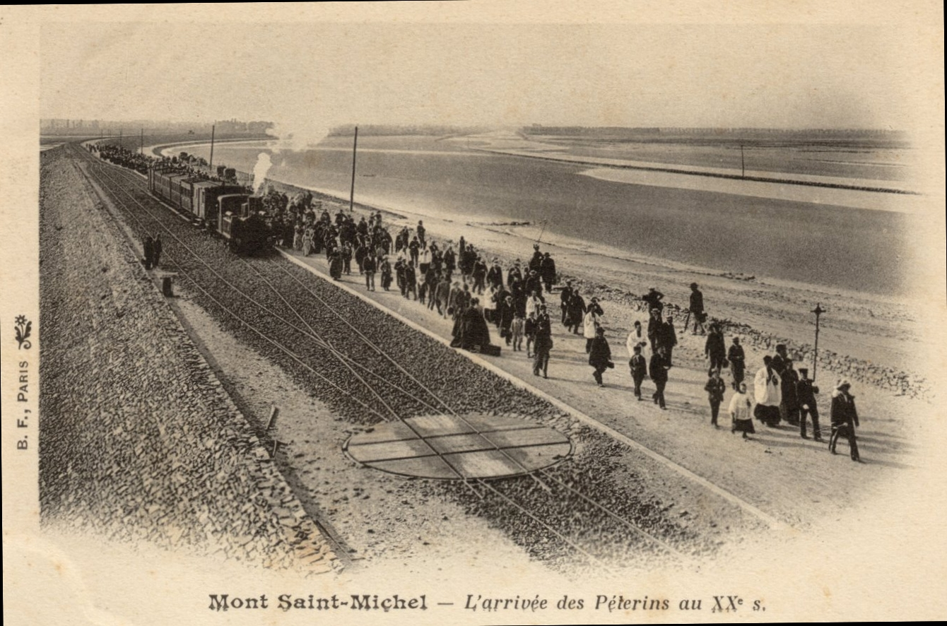 Vue d'une rame du tramway de la ligne de Pontorson au Mont-Saint-Michel en gare du Mont-Saint-Michel - Arrivée de pélerins, vue sur la plaque tournante destinée à retourner les machines.